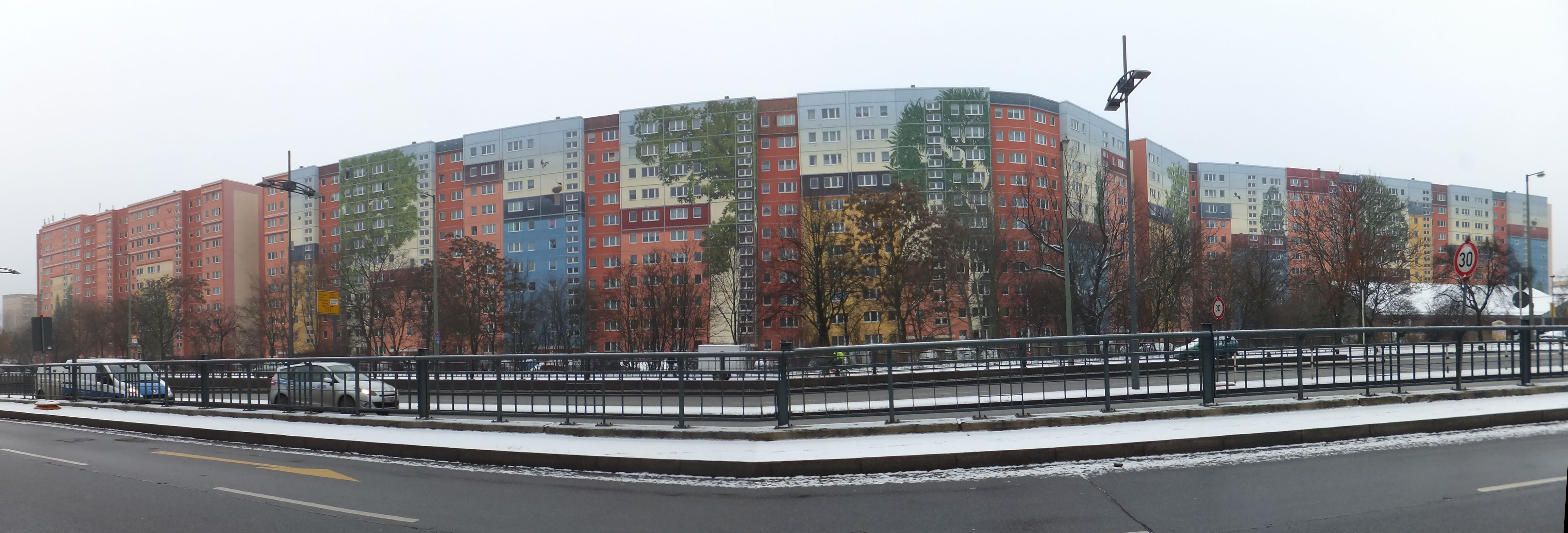 Wohnschlange Alt Friedrichsfelde / Am Tierpark mit Wandbild; Teile "Friedrichsfelder Tor" und "Friedrichsfelder Bilderstadt". Teil 3 (linker Gebäudeflügel) ist noch nicht fertig